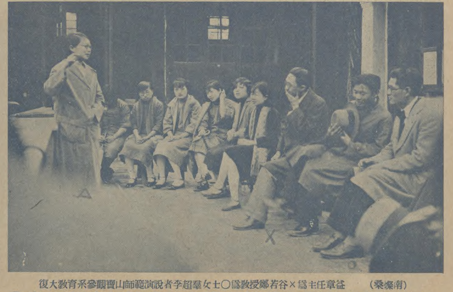 中文（台灣）: 《圖畫時報》 1930年第660期